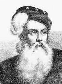 Anders Bure, svensk kartograf